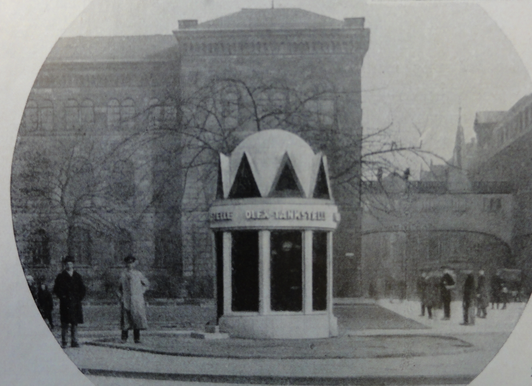 Erste Tankstelle in Hannover, Raschplatz östlich vom Hauptbahnhof, rechts Amtsgericht, Blick in Richtung des heutigen Gebäudes der Staatanwaltschaft aus "Echo Continental" 1923, Firmenzeitung der Continental Gummiwerke Hannover AG